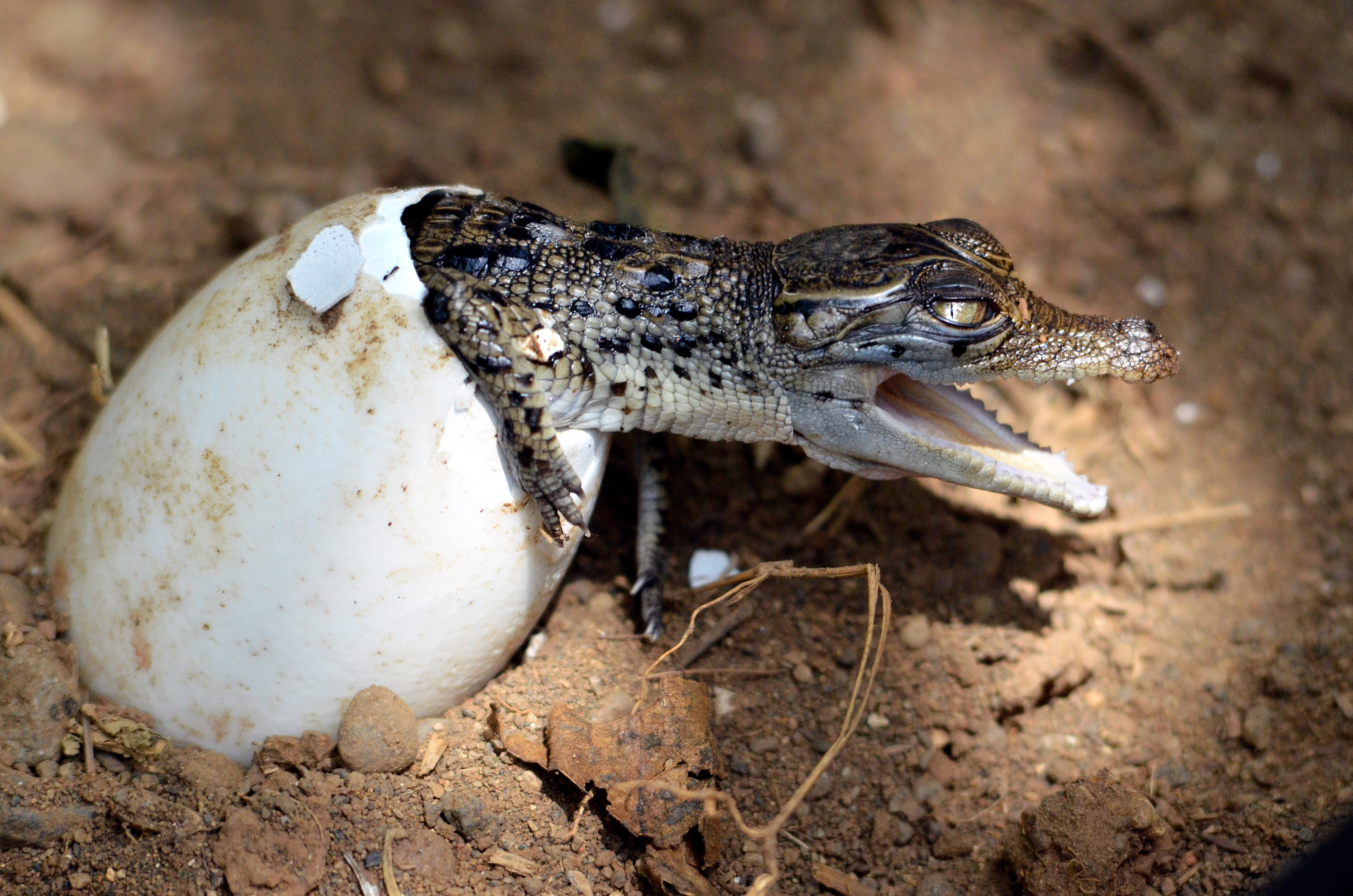 Bayi Buaya berusaha keluar dari cangkang telur di Kebun Binatang Mangkang Semarang